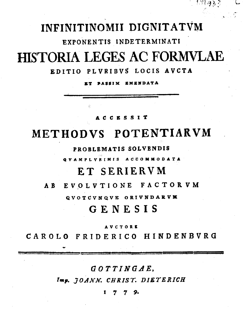 Frontespizio